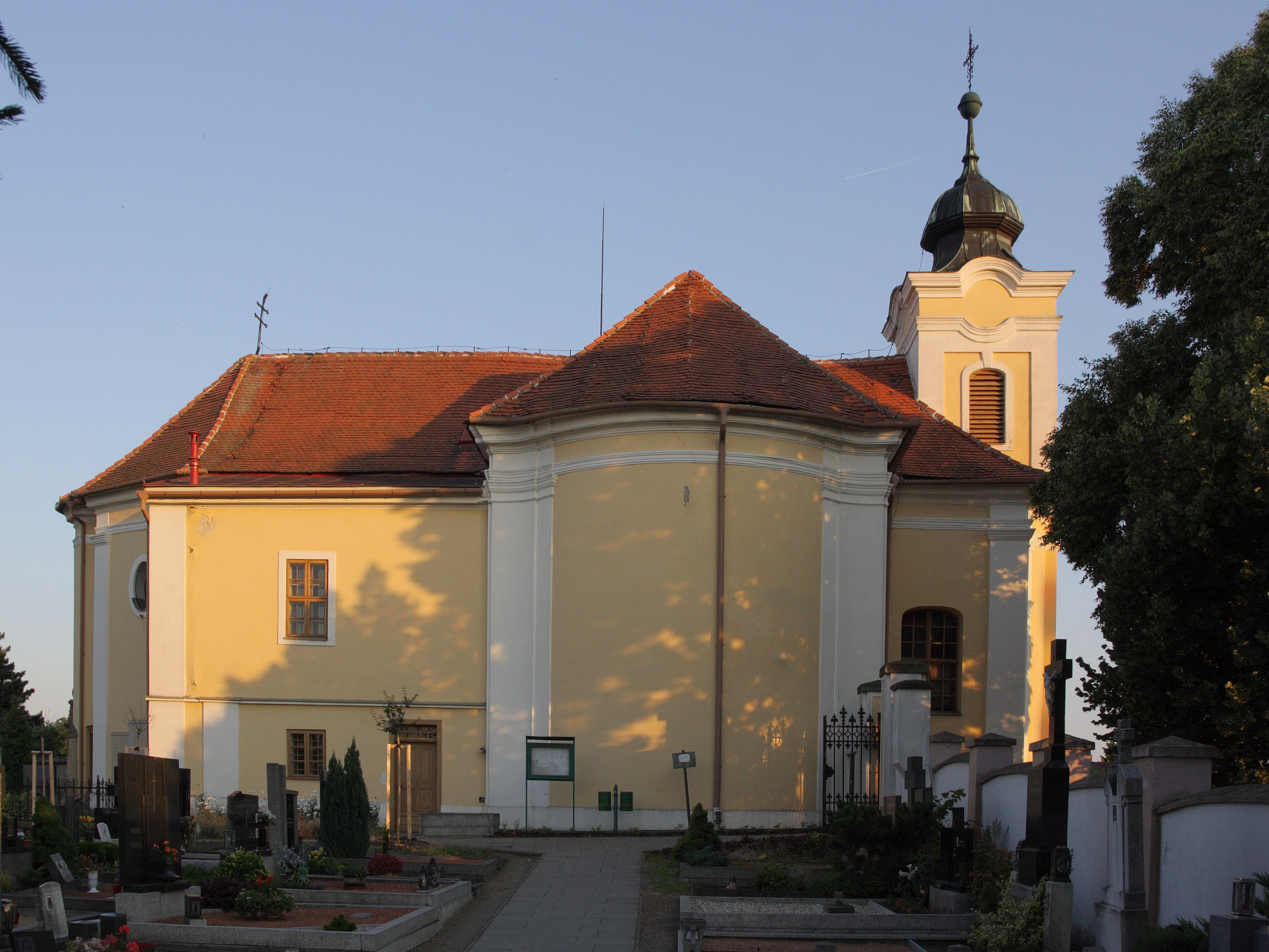 Rajhrad - kostel Povýšení svatého Kříže.